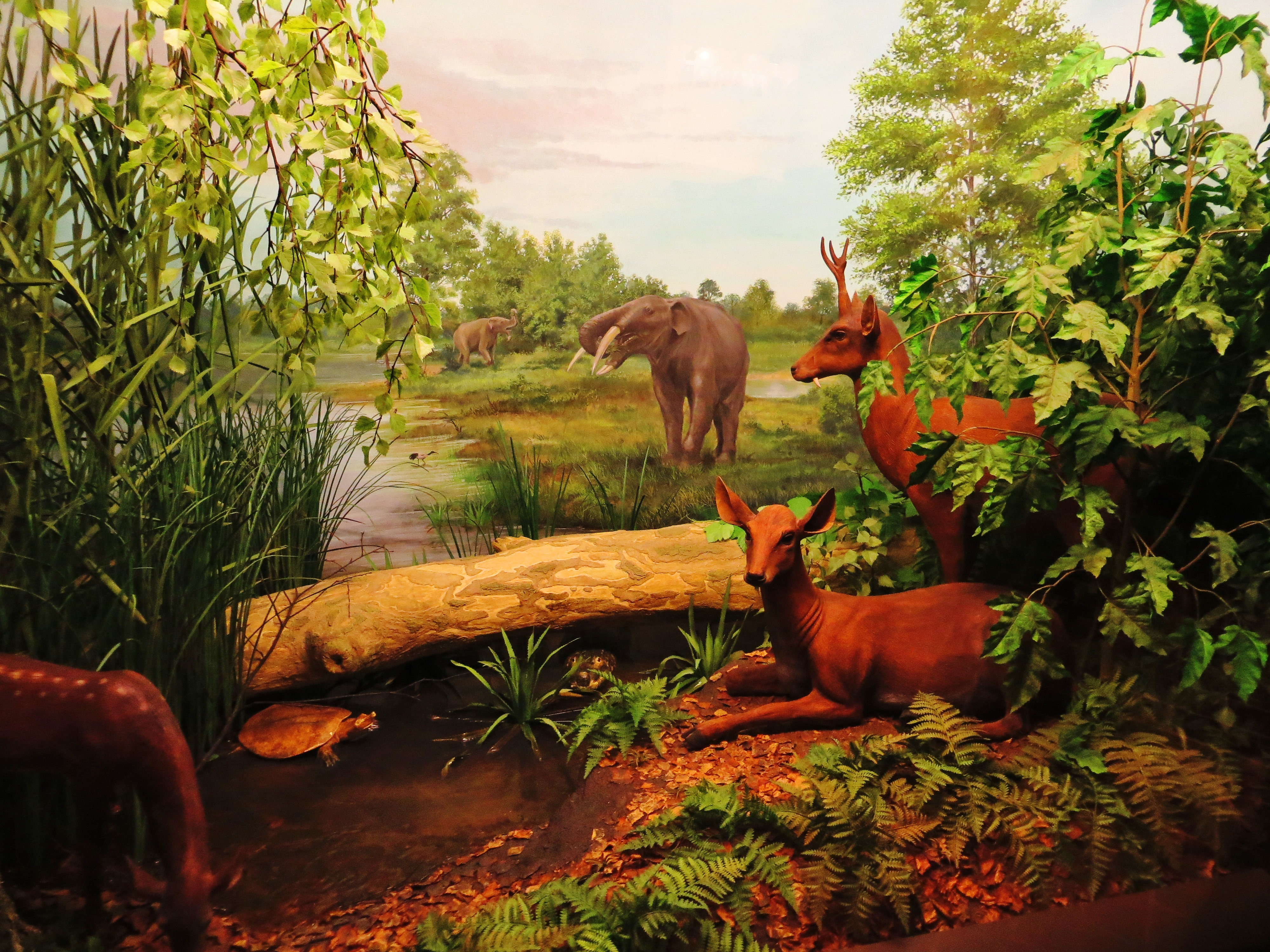 Took the picture at Museum Mensch und Natur, Munchen